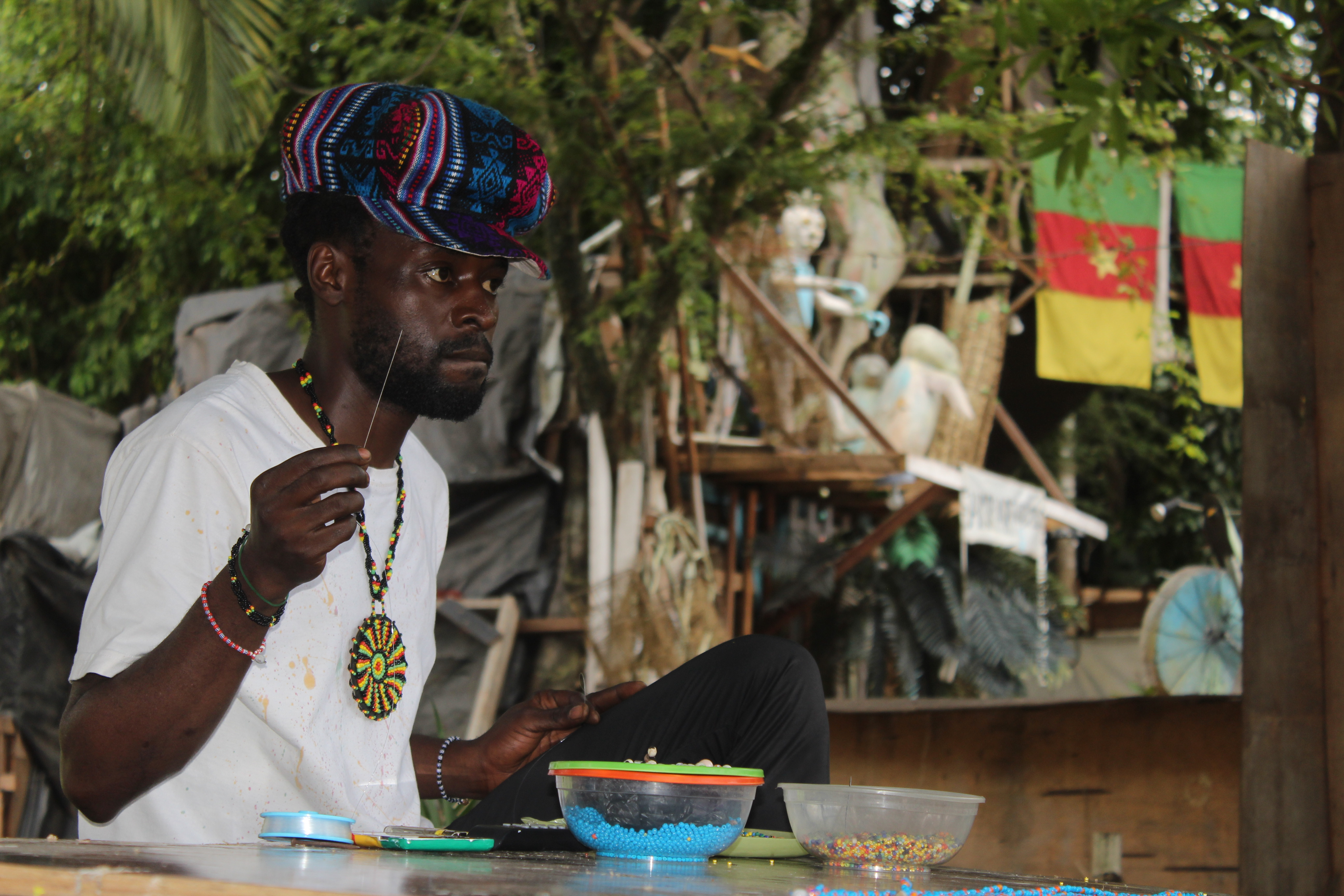 Wilfrid est parmi les jeunes Camerounais qui se battent chaque jour pour imposer leur art de vivre.Attraver la technique et son discoyrs artistique il propose dans son espace les accessoires tableaux sandales qu il confectionne avec tout le soin possible à la main.Le designer du coin un mode de vie